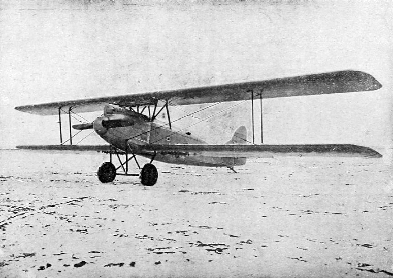 Bombardér Letov Š-6 (1923)